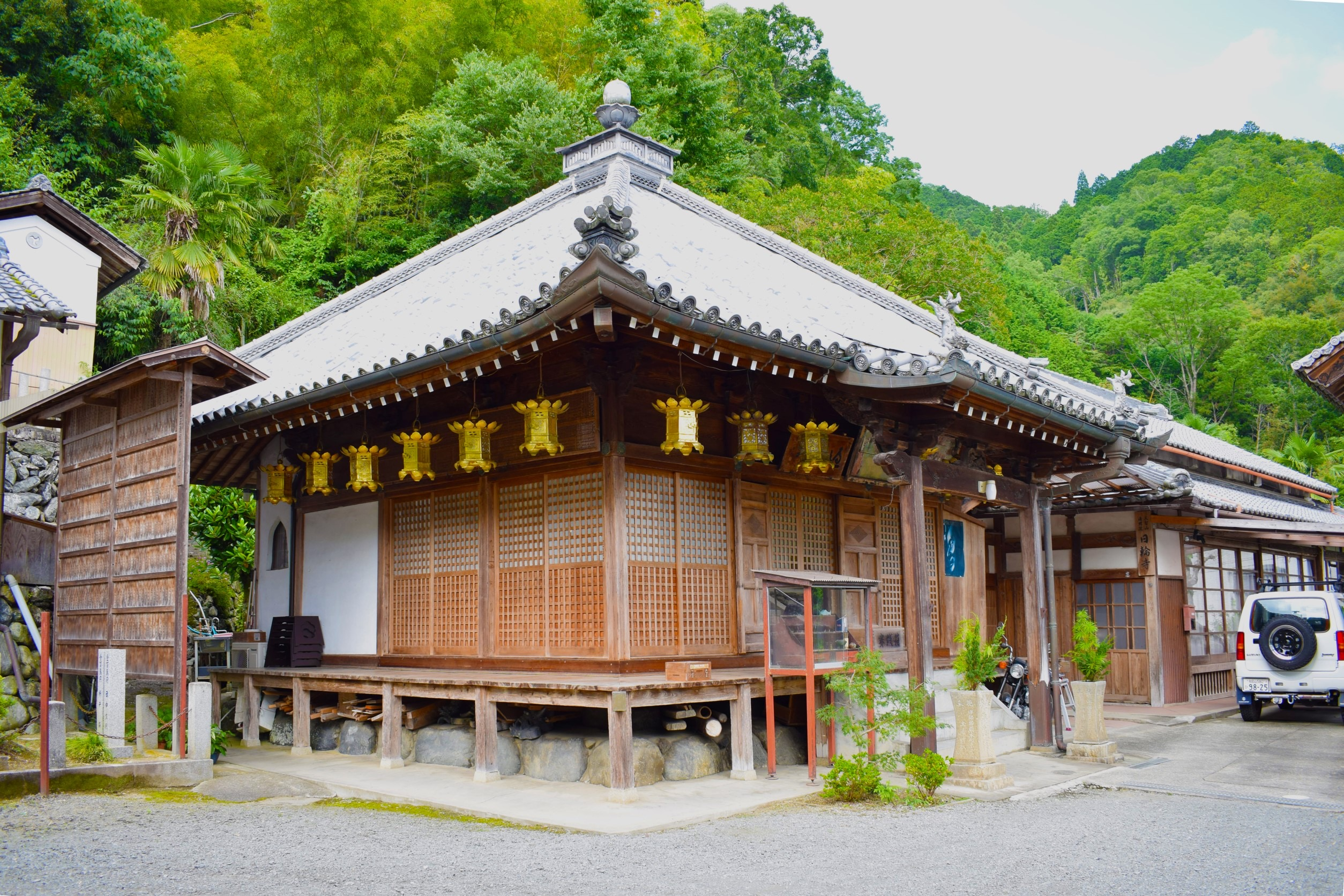 本堂